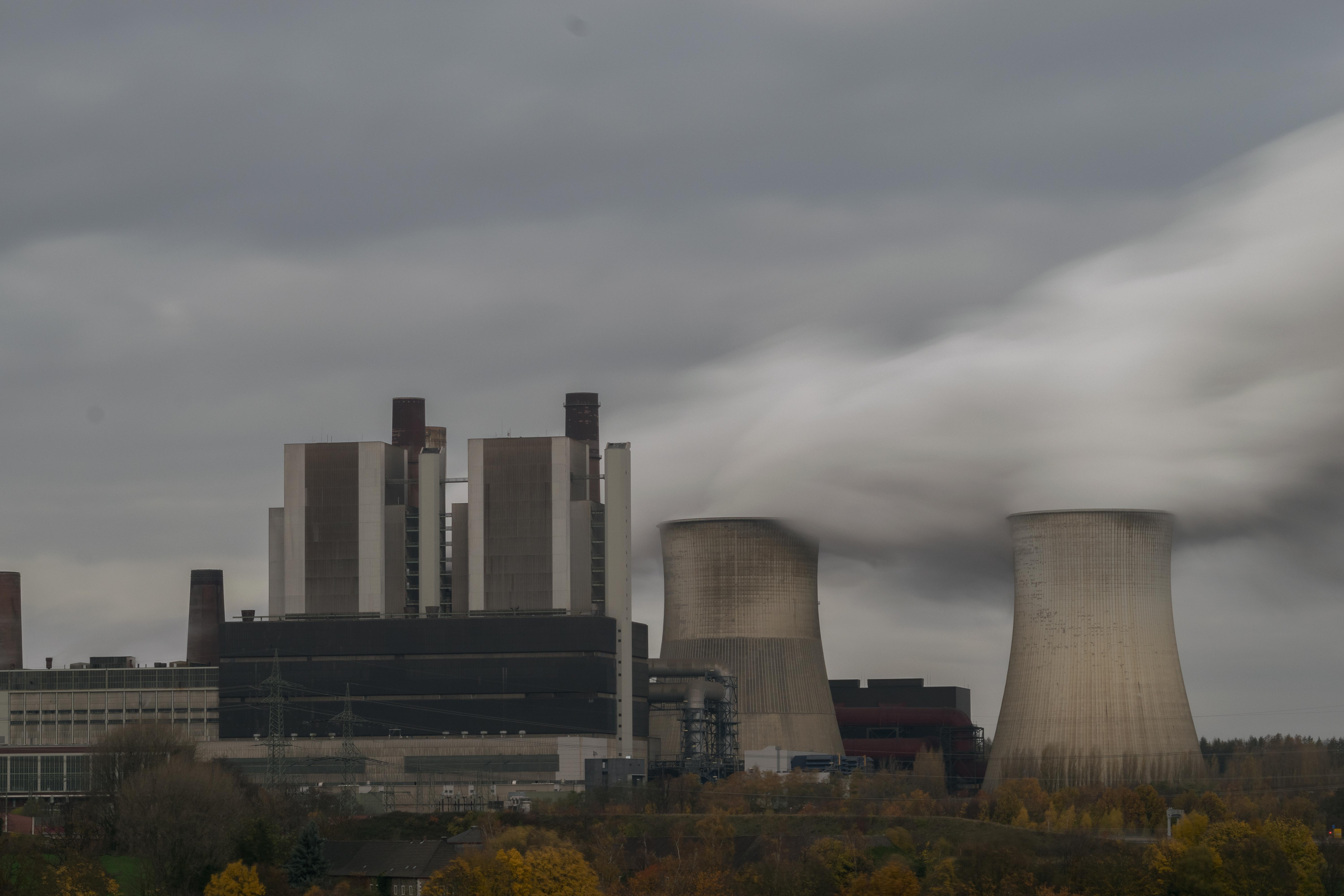 Das RWE Kraftwerk Weisweiler.